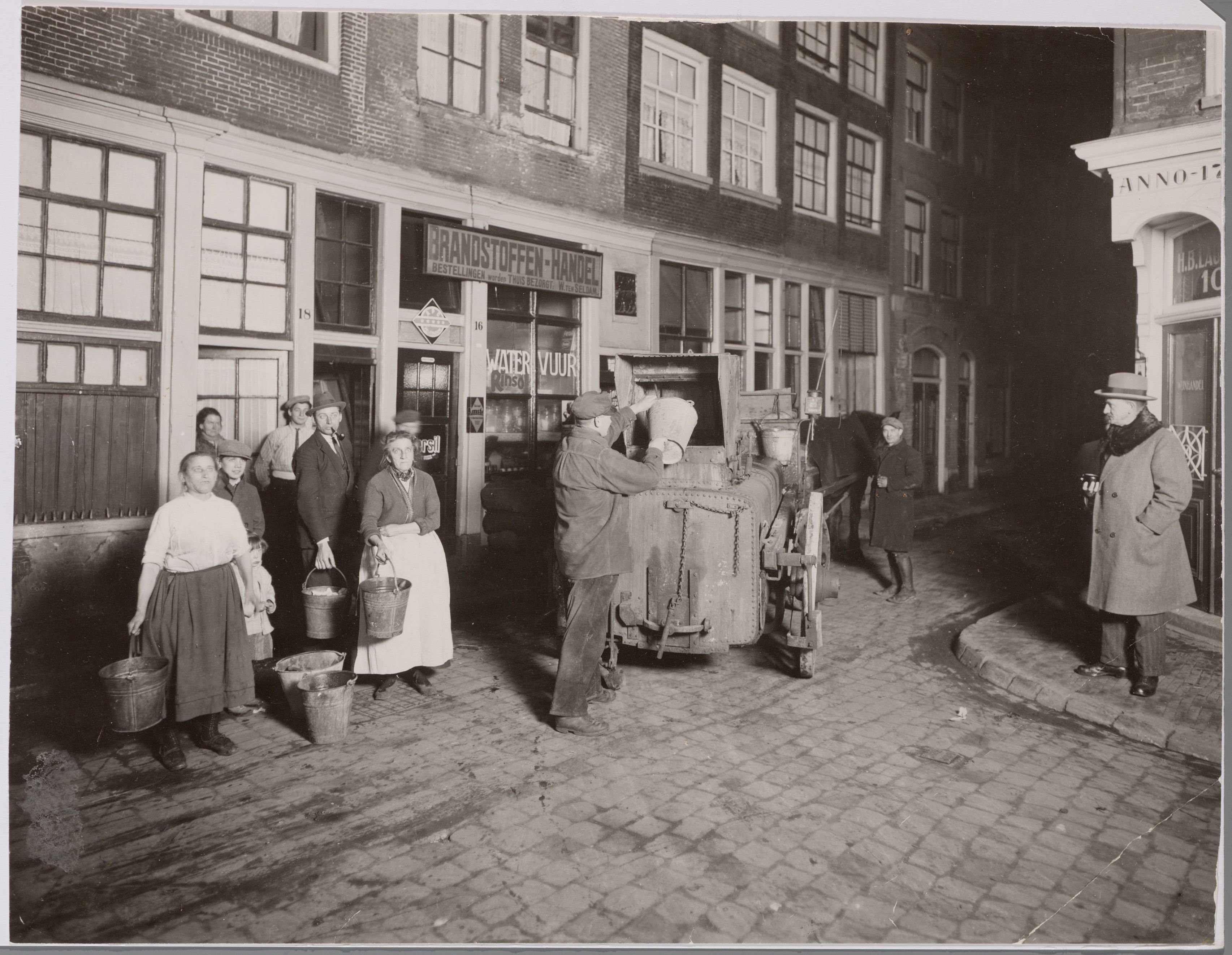 GegevensTitel: Het ophalen van faecaliën met de beerwagen of Boldootkar bij de Tweede Looiersdwarsstraat 18-16; op nr. 16: de water en vuurnering van SeldamBeschrijving: Geheel rechts de gemeente-arts Kooistra.Documenttype: fotoVervaardiger: Stadsreiniging Collectie: Archief van de Dienst der Stadsreiniging en rechtsopvolger: foto's en dia'sDatering: 1928Inventarissen: aanduiding: Straat Tweede LooiersdwarsstraatHuisnummer van / tot 16 - 18 Rechthebbende: Stadsarchief AmsterdamGebruiksvoorwaarden: -Afbeeldingsbestand: 5274FO000002